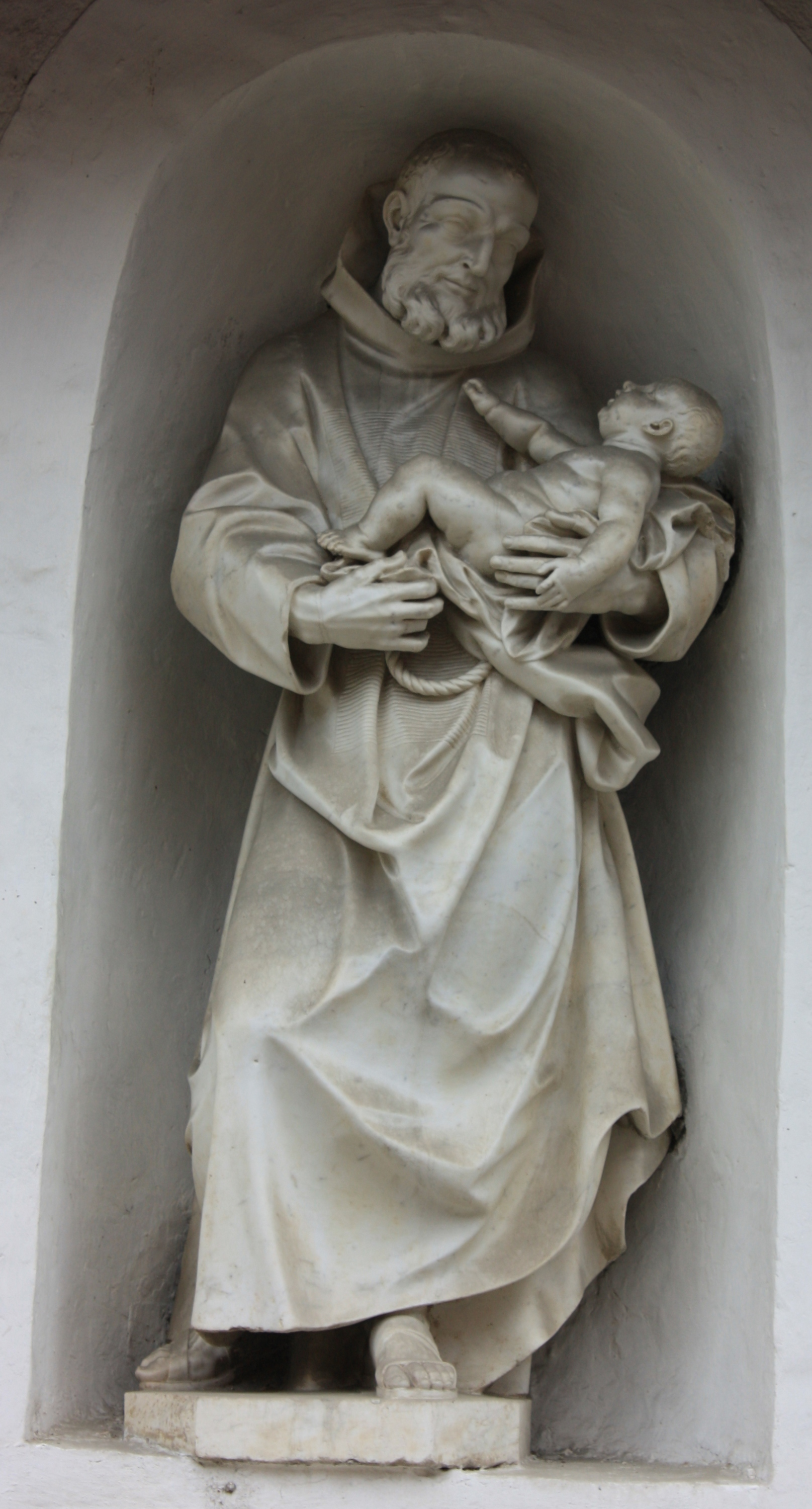 Klausen, Südtirol: Der Heilige Felix am Portal der Kirche des Kapuzinerkloster